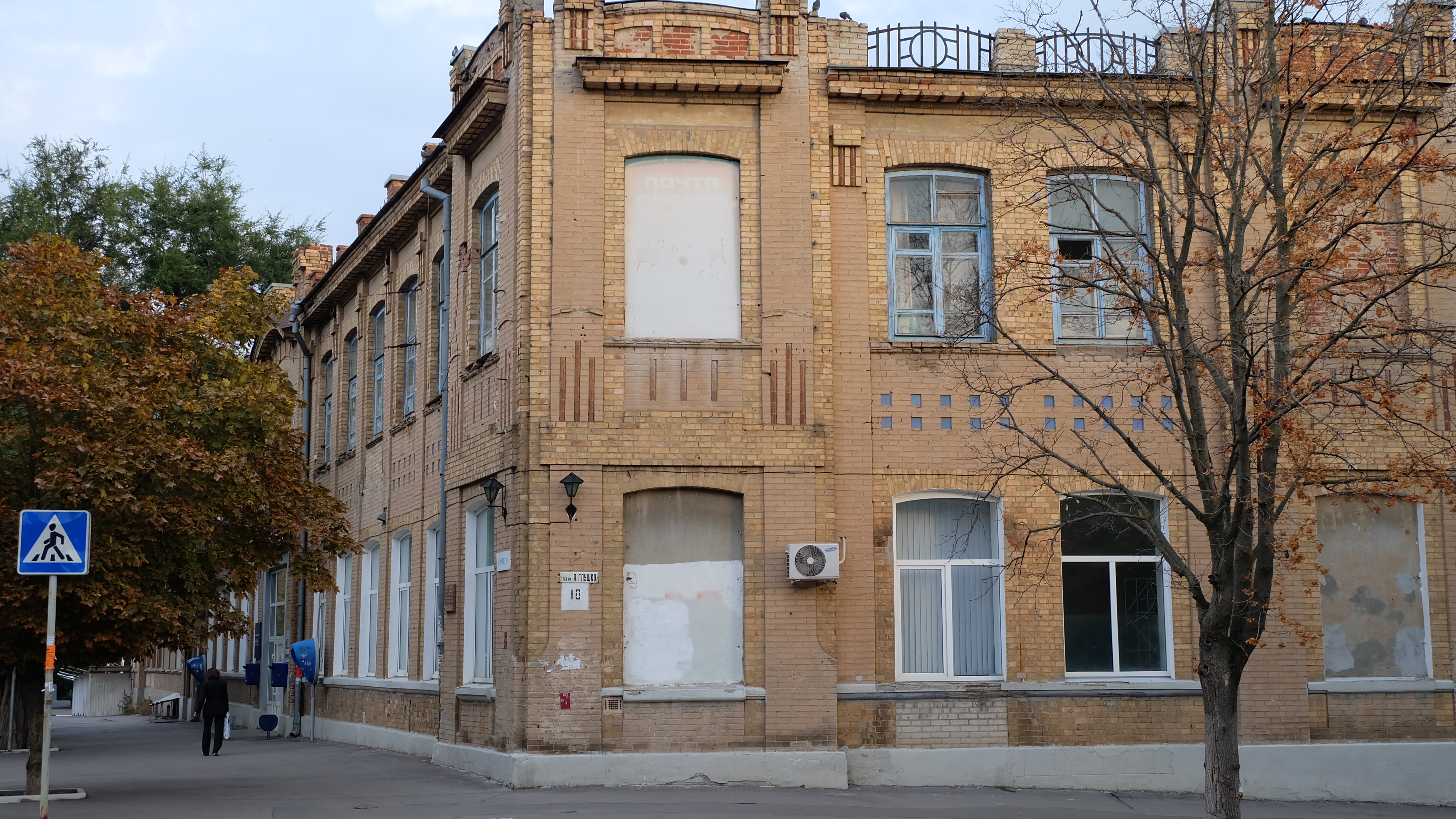 Банкирский дом Давидовичей (главпочтамт): улица Фрунзе, 38, Таганрог, Ростовская область